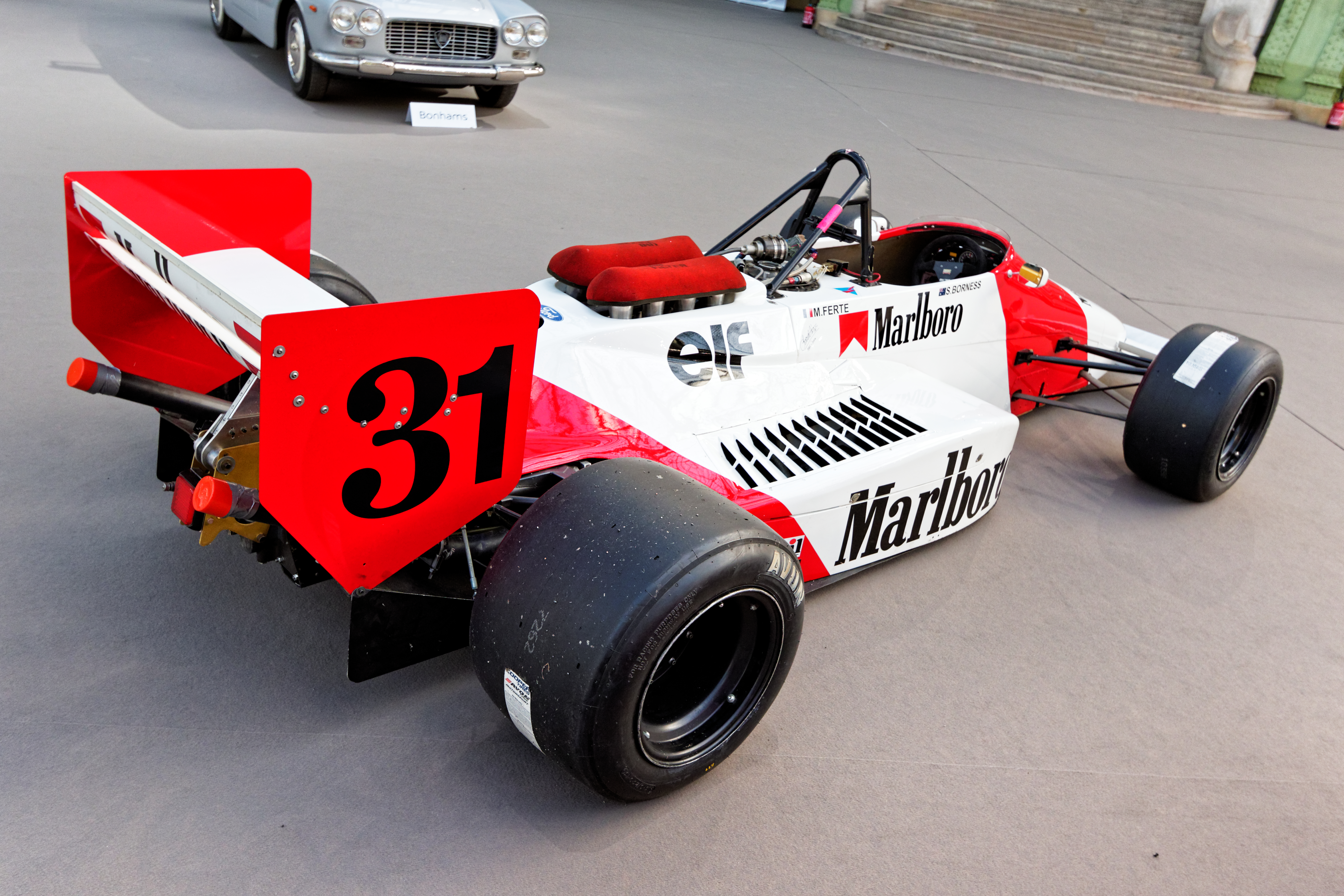 Un des véhicules présenté lors de la vente aux enchères Bonhams 2016 au Grand Palais de Paris.